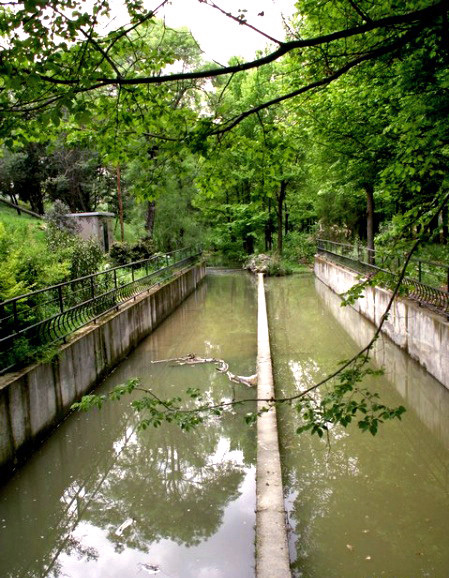 Canalización del arroyo Meaques en las proximidades del Lago de la Casa de Campo, Madrid.